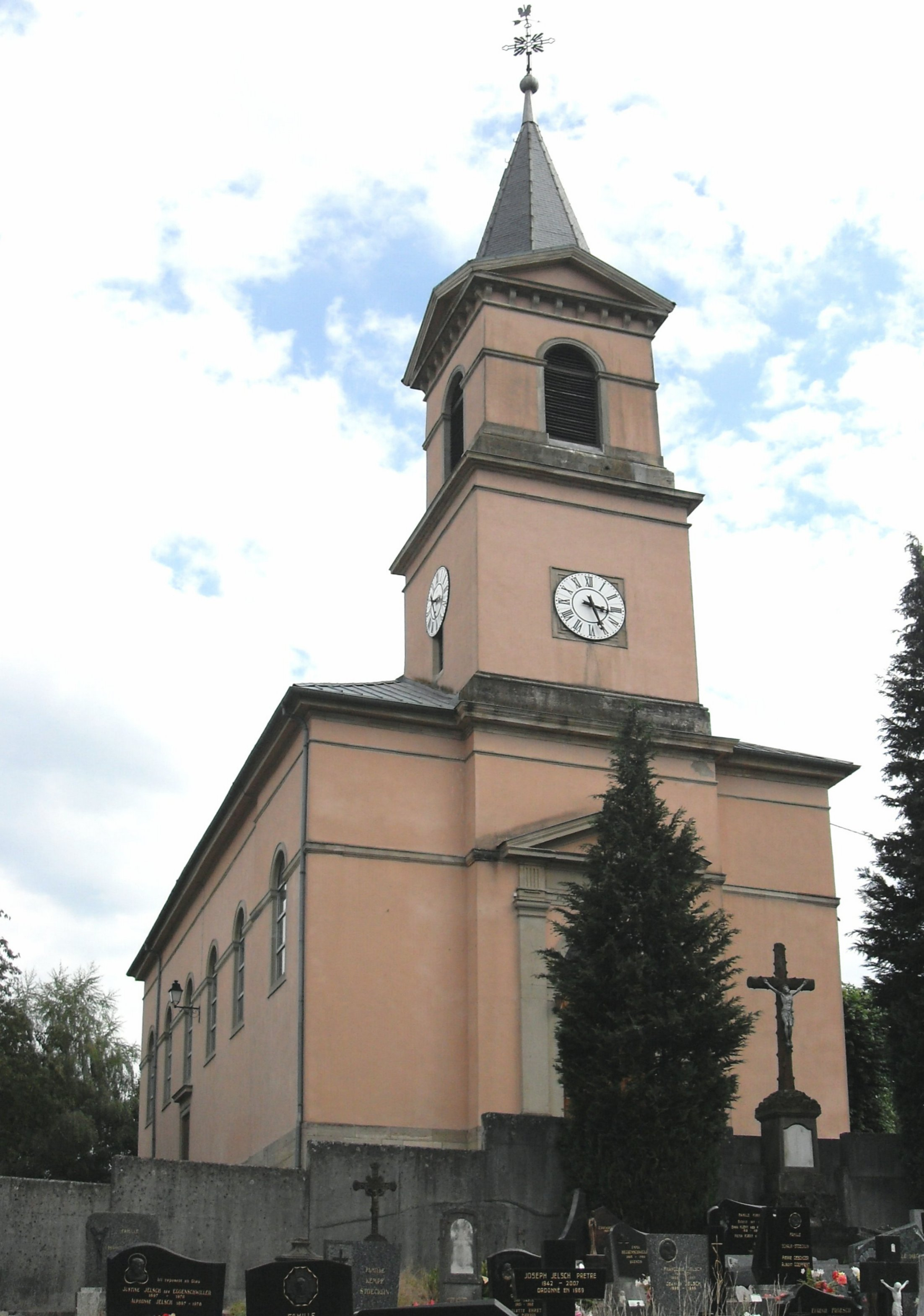 L'église Saint-Sigismond à Ruederbach